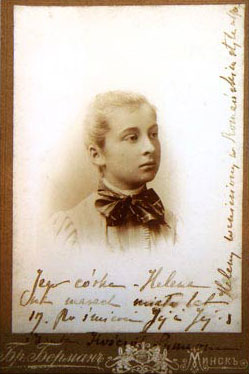 Беларуская (тарашкевіца): Партрэт Алены Вайніловіч (Alena Vajniłovič), дачкі Эдварда